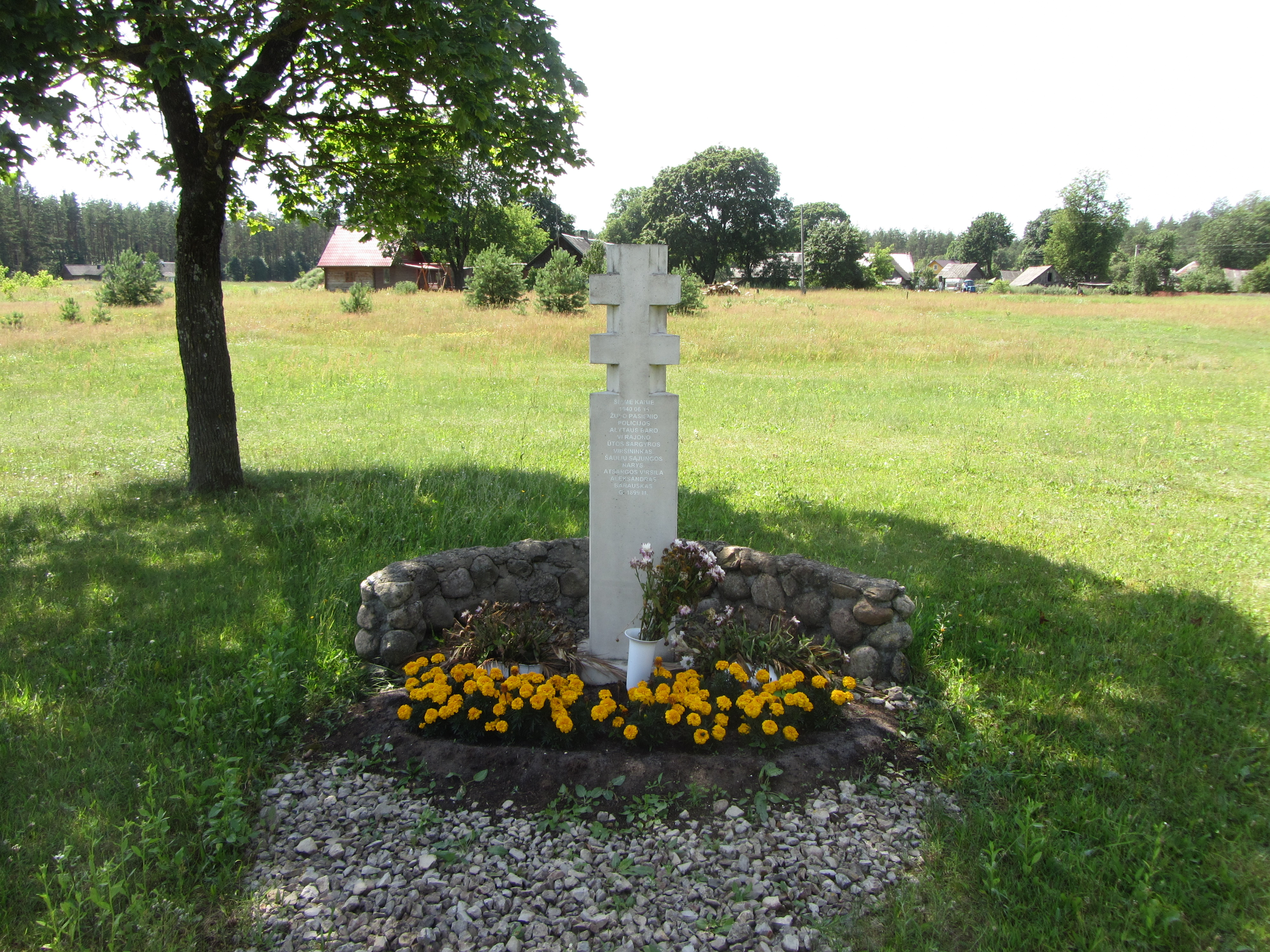 Ūta 65275, Lithuania